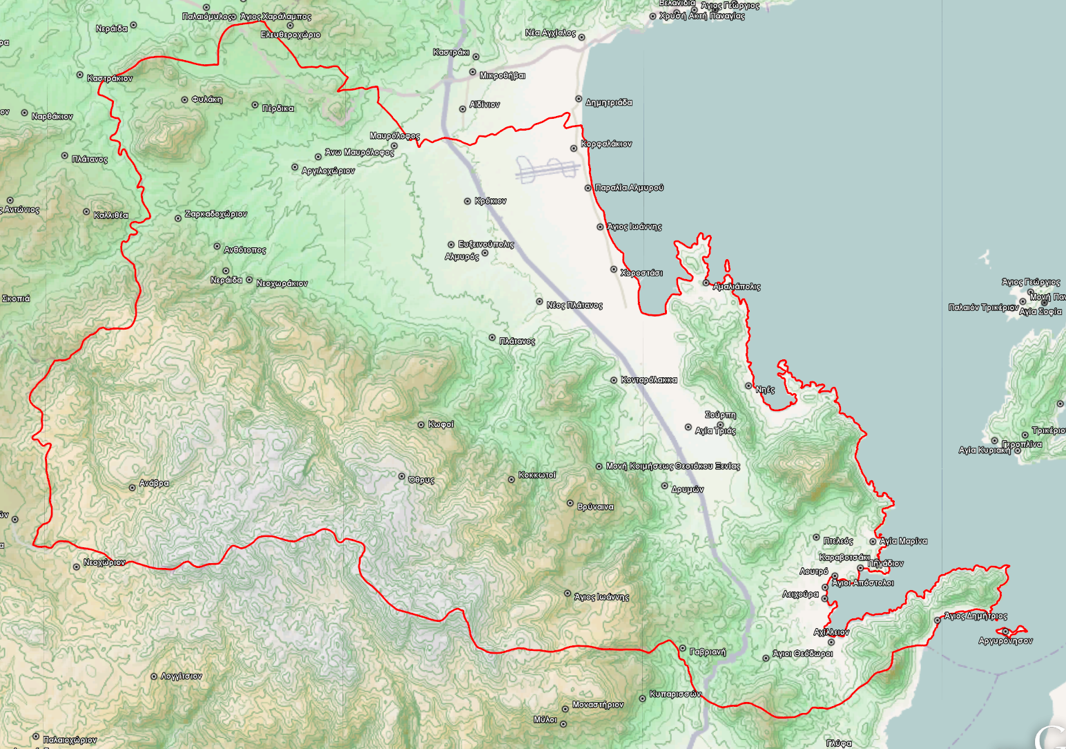 Τοπογραφικός χάρτης του Δήμου